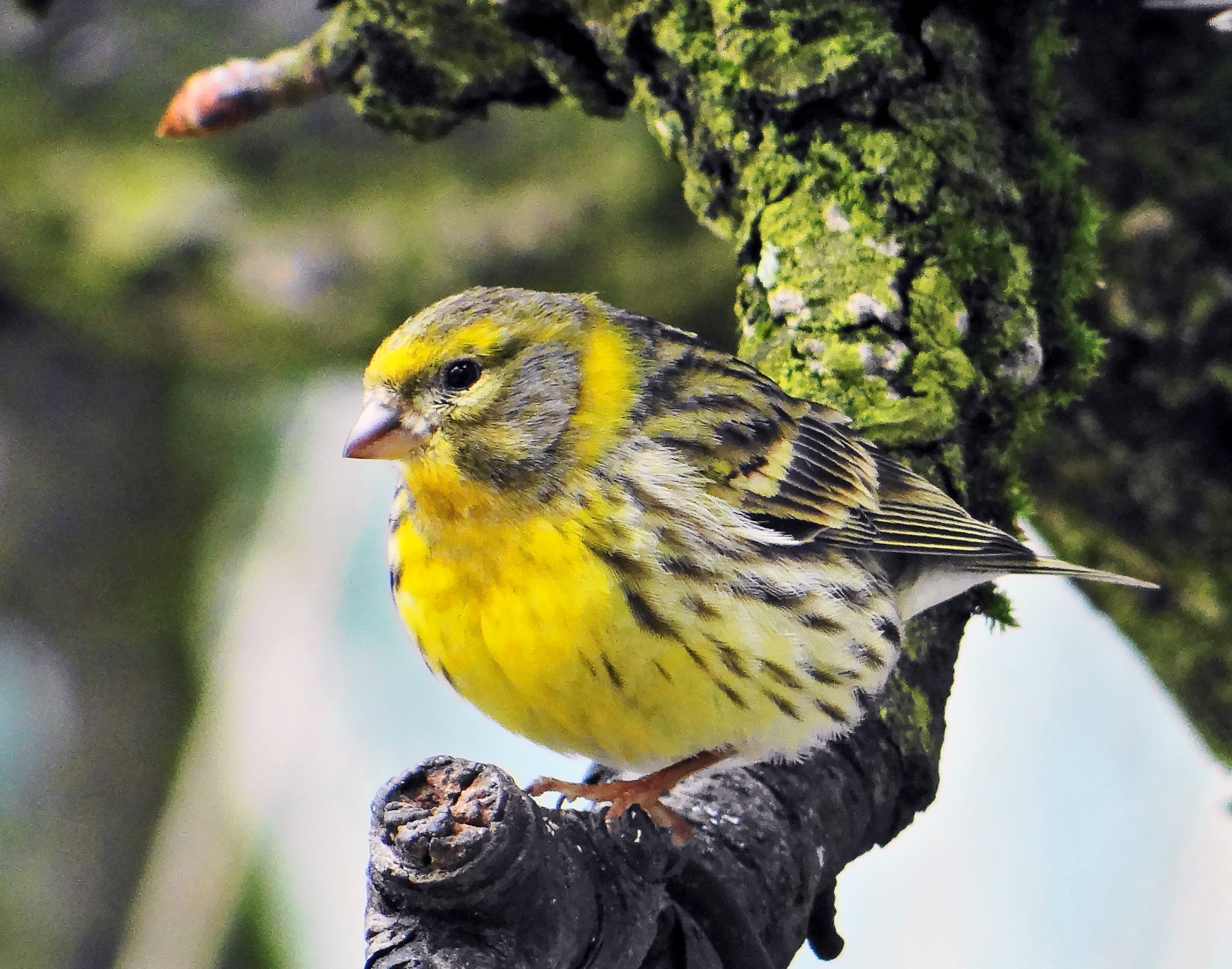 Serin cini mâle mars 2013